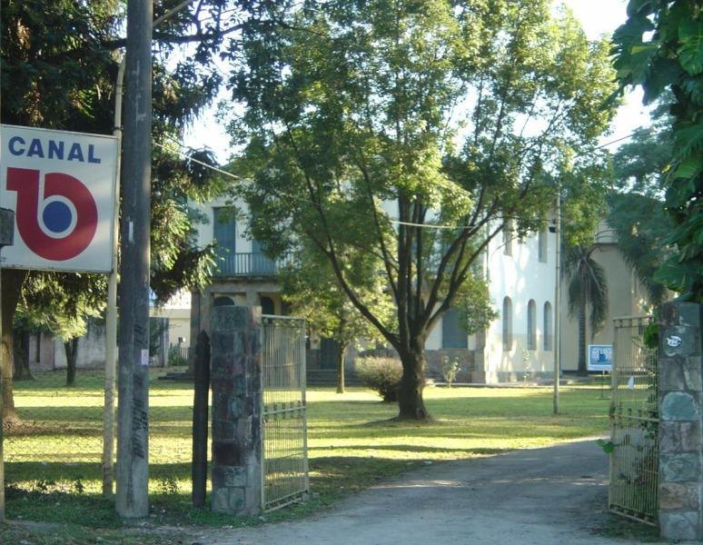 Channel 10 studios / estudios de canal 10, Yerba Buena, Tucumán, Argentina